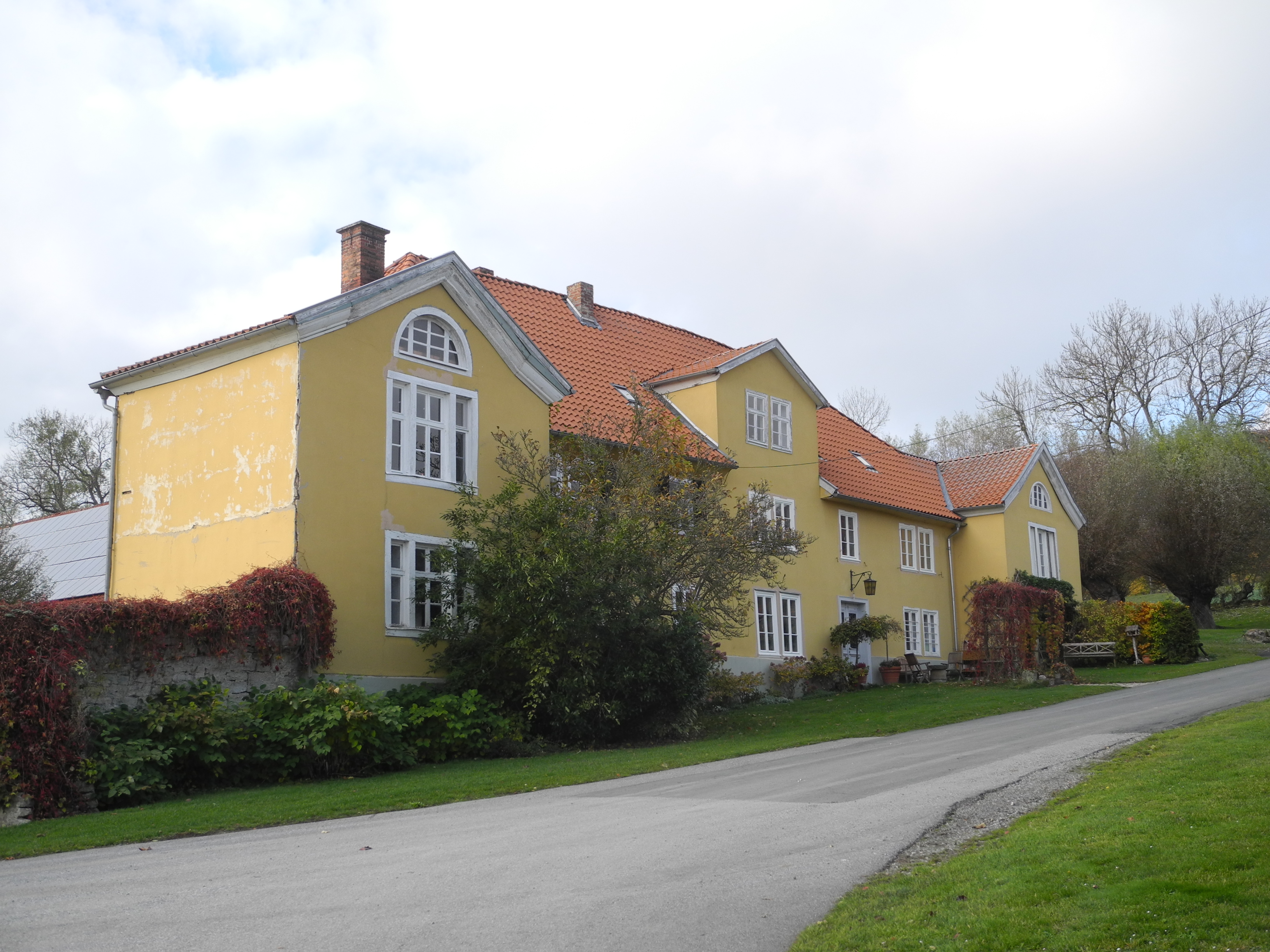 Das Herrenhaus in Sieberhausen, heute ein Teil von Zierenberg, Hessen, Deutschland.